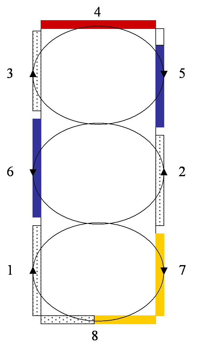 Sens de lecture du sarcophage d'Aghia Triada en fonction des couleurs de l'arrière plan.